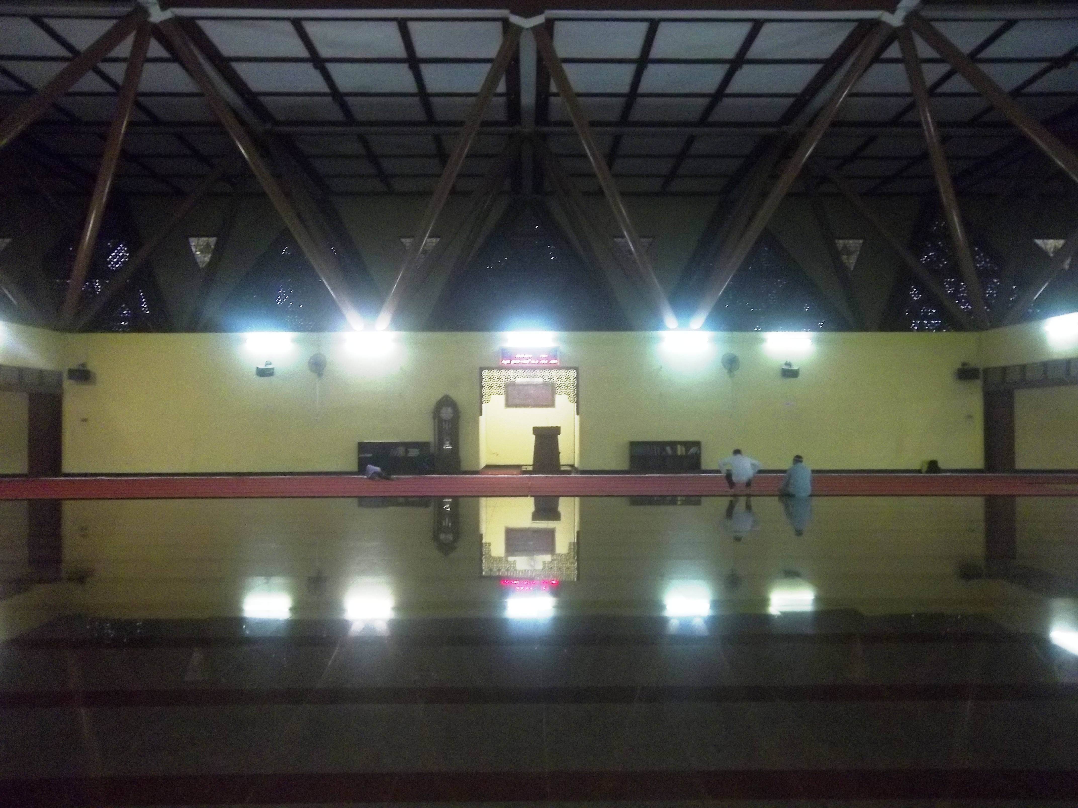 Tampak dari dalam masjid Al Huriyyah, memperlihatkan rangka segitiga yang khas